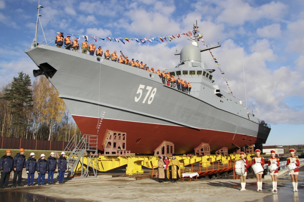 Церемония спуска на воду построенного для Военно-Морского Флота России шестого серийного (седьмого по счету) малого ракетного корабля нового поколения проекта 22800 «Буря» на судостроительном предприятии «Пелла»